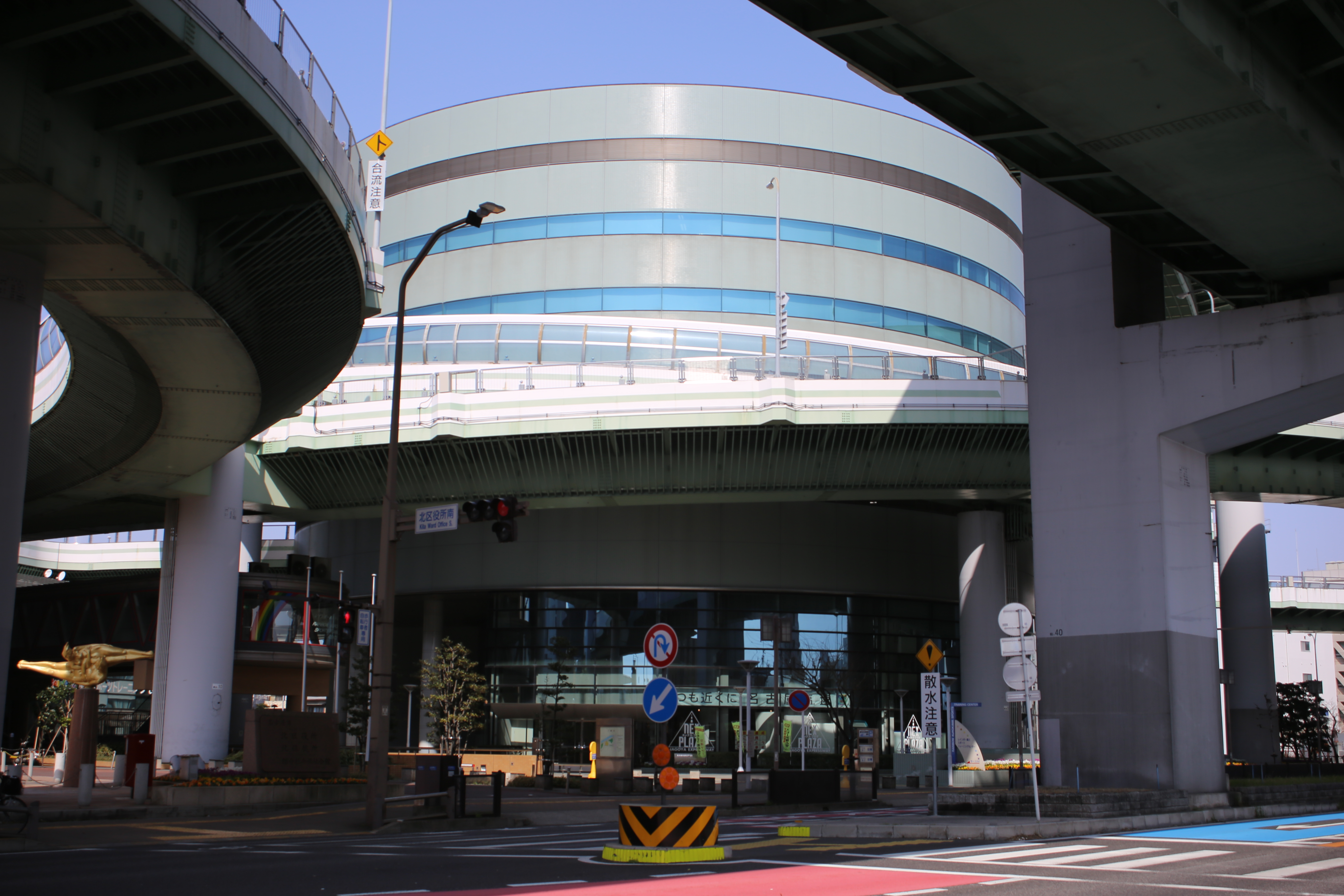 名古屋市北区清水四丁目の名古屋高速道路黒川ビルを東側公道南側より撮影